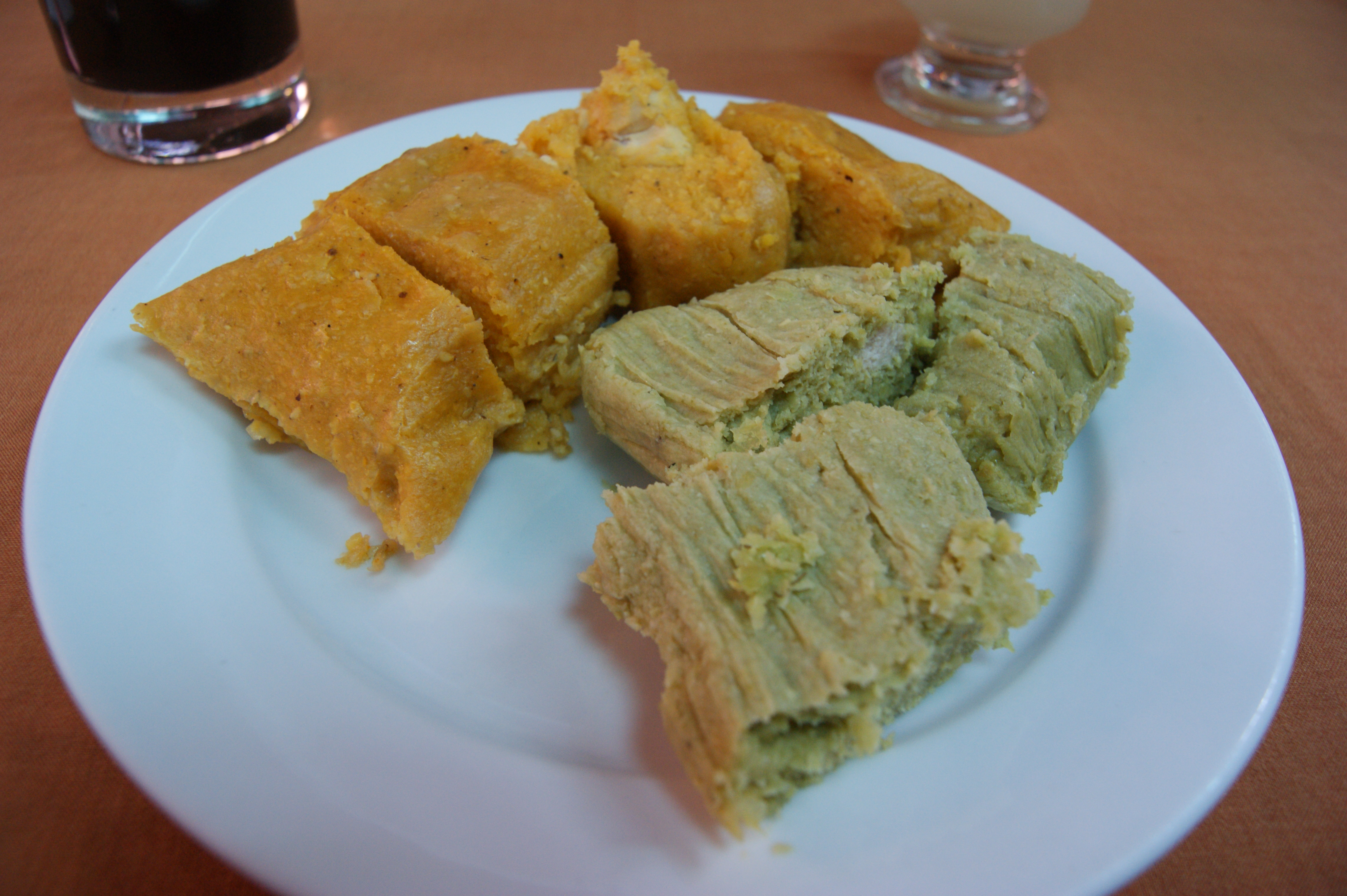 Tamal criollo (color amarillo) y tamalitos verdes (color verde) servido en el restaurant "El Bolivariano" de Pueblo Libre. Lima - Perú.